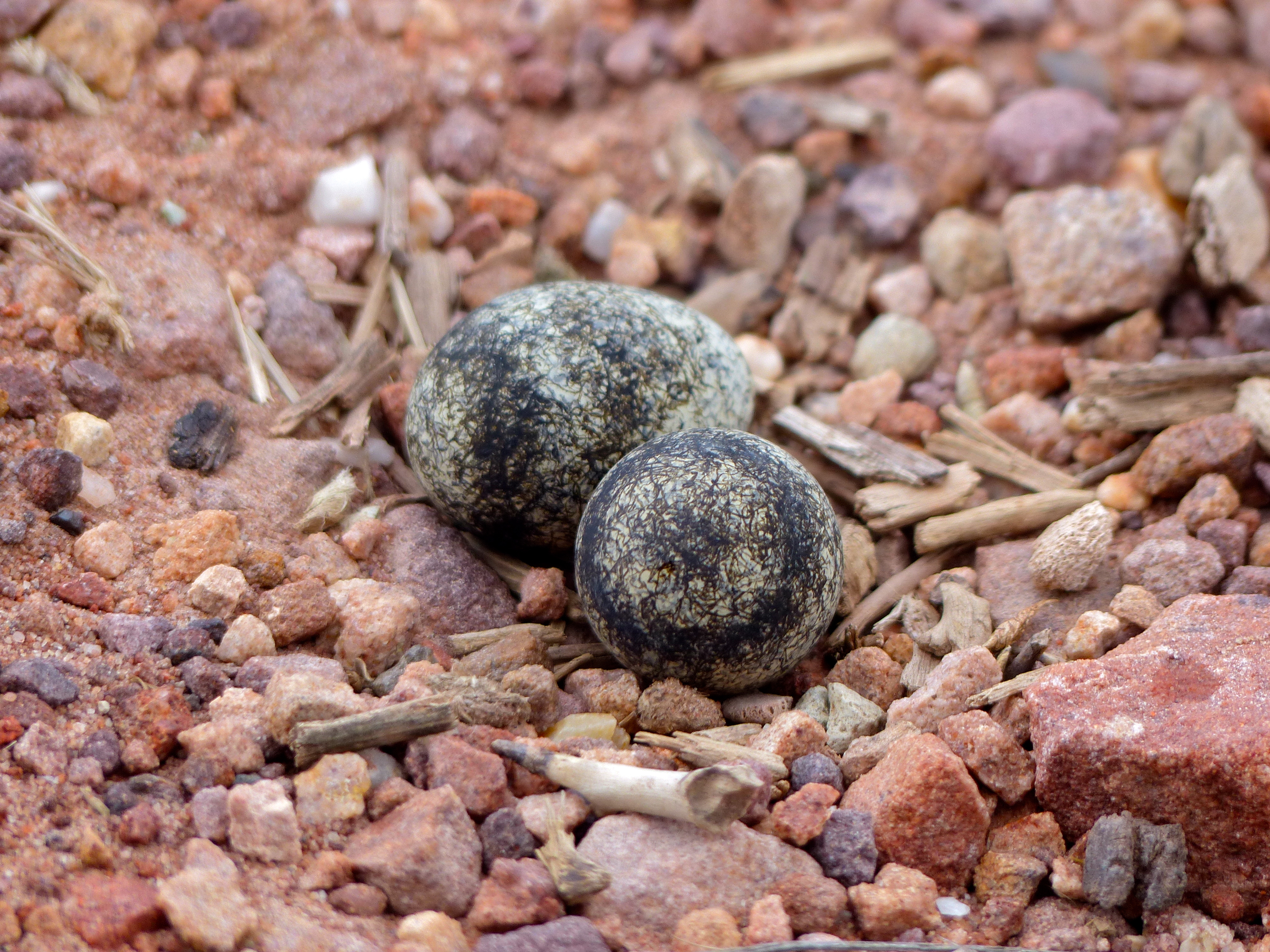 Mahonie Loop near Punda Maria, Kruger NP, SOUTH AFRICA